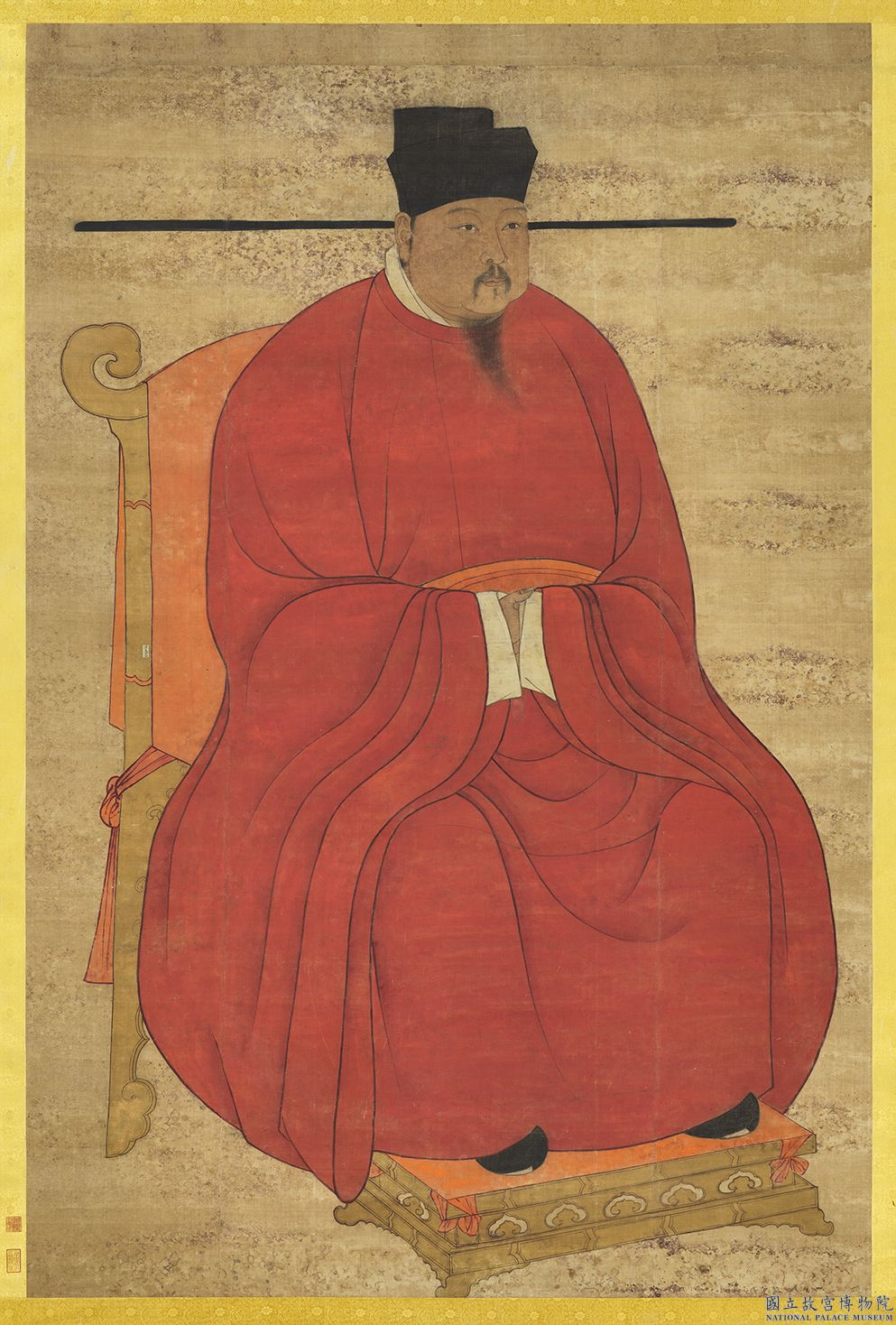 宋真宗坐像 軸